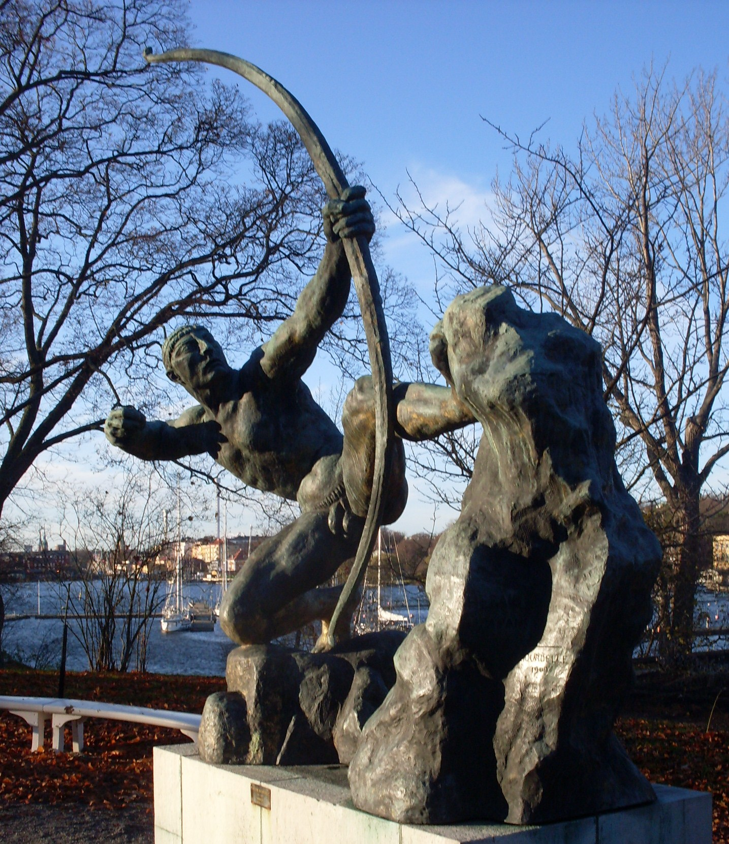 Stockholm. Waldemarsudde. Herakles av Antoine Bourdelle